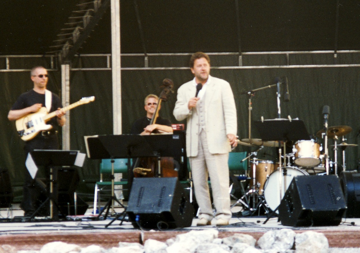 Tommy Körberg på Dalhalla 19 juli 1997